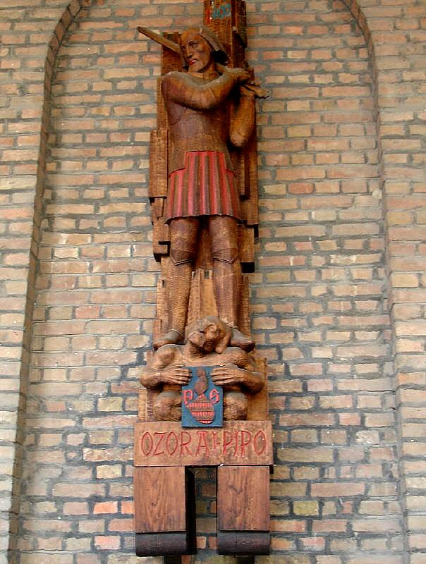 Ohmann Béla: Ozorai Pipo, Luxemburgi Zsigmond (1368-1437) olasz származású magyarországi hadvezére. Elhelyezték: 1932, színezett hársfa.